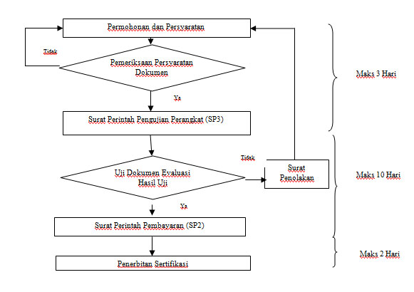 Prosedur Sertifikasi melalui Uji Dokumen